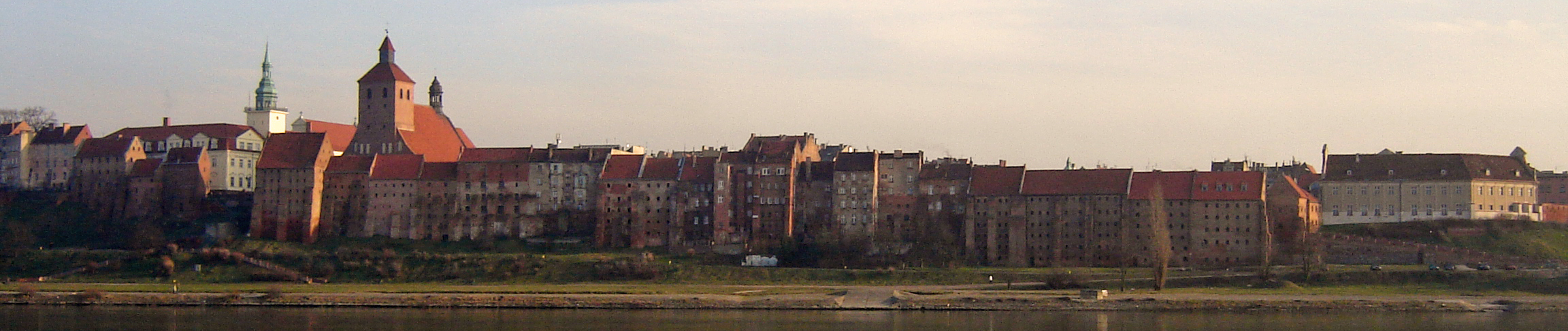 Panorama Grudziądza 2007 // The skyline of Grudziądz (Poland)